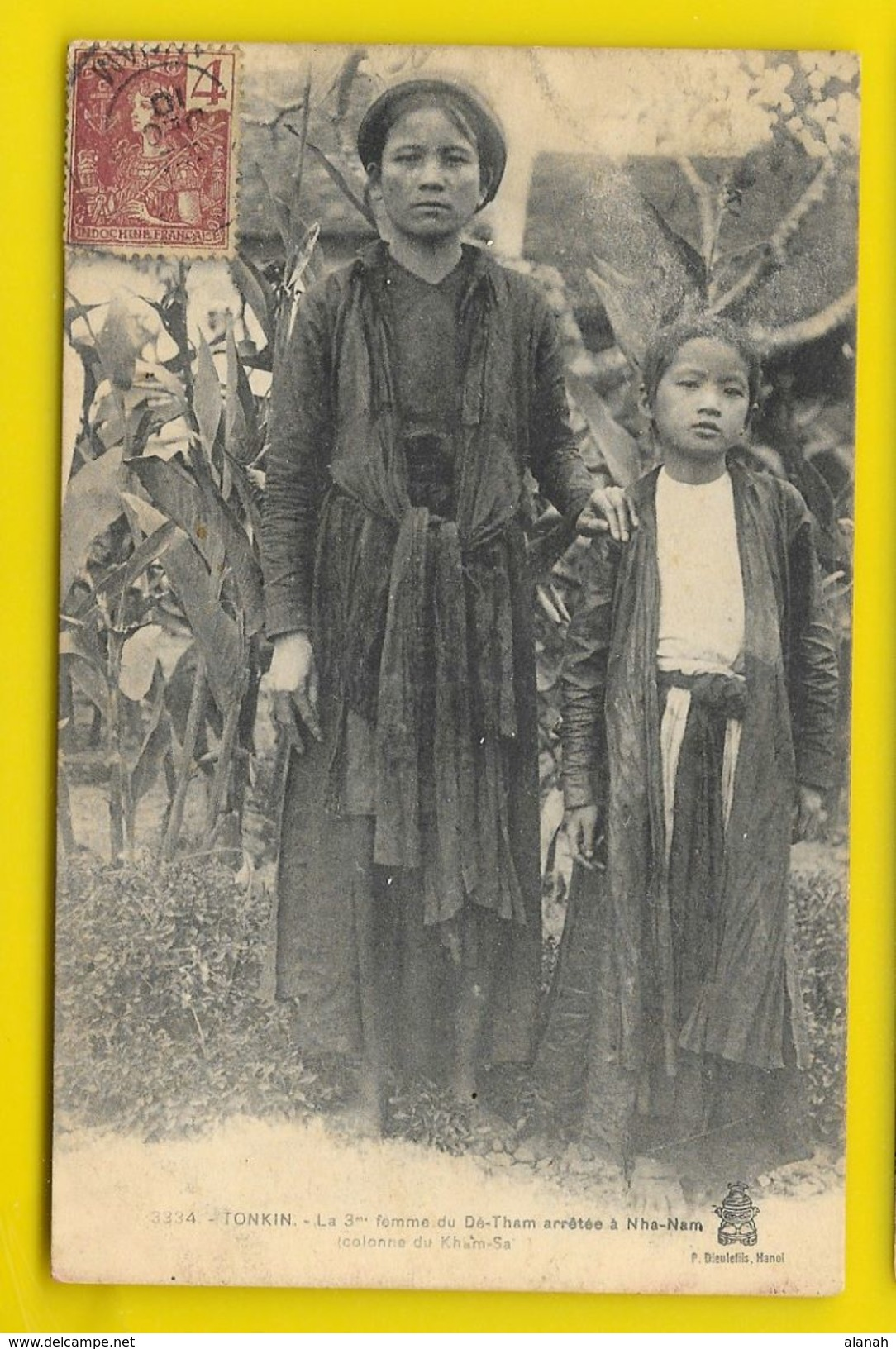 La 3° Femme du Dé-Tham arrêtée à Nha-Nam (Dieulefils) Tonkin.